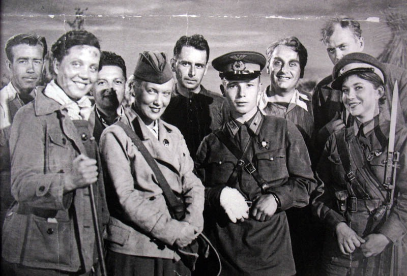 На съемках "Боевого киносборника № 4" в августе 1941 года. Любовь Орлова и Григорий Александров с актрисами Мариной Гаврилко и Елизаветой Кузюриной. В центре - летчик Виктор Талалихин. Через два месяца он погибнет